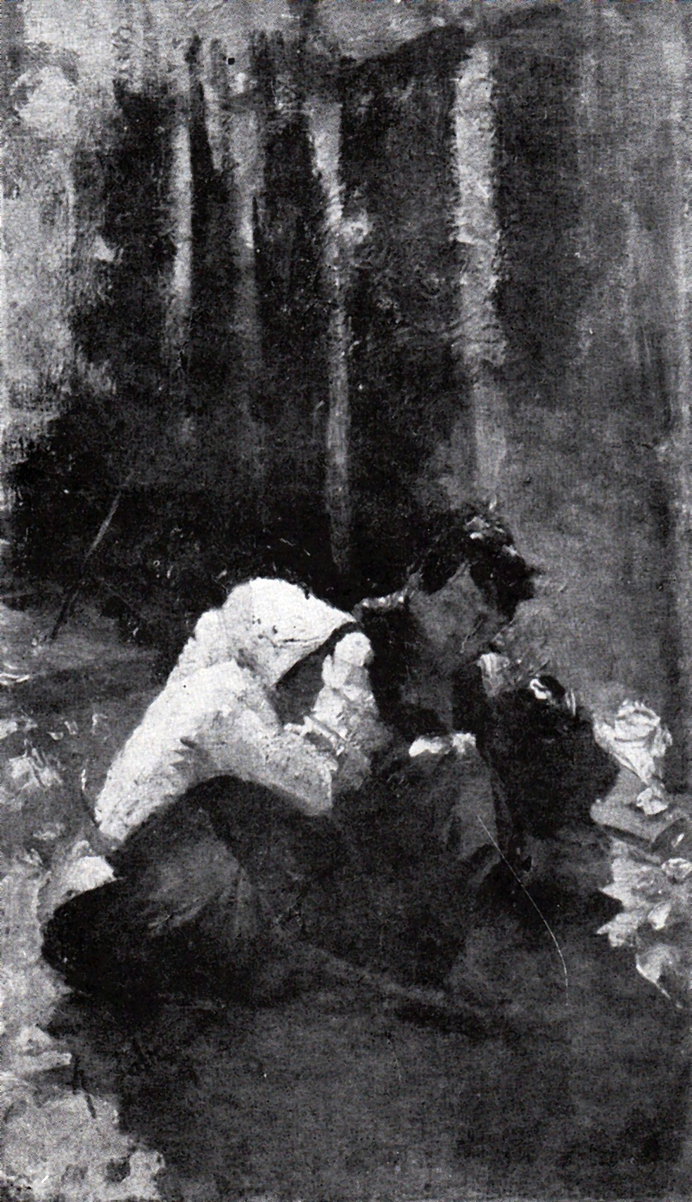 Cersetorii